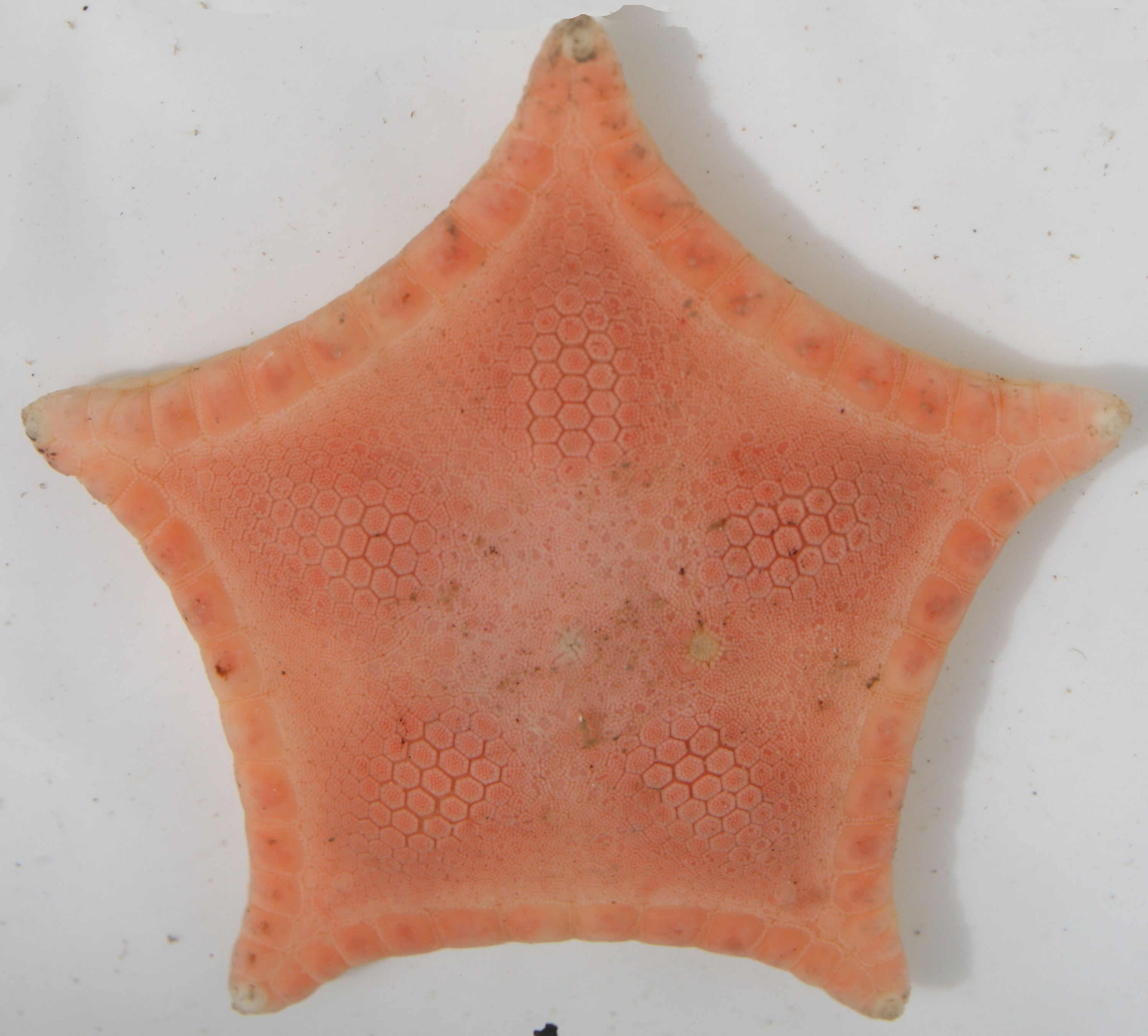 Sjøkjeks, Ceramaster granularis, 25mm